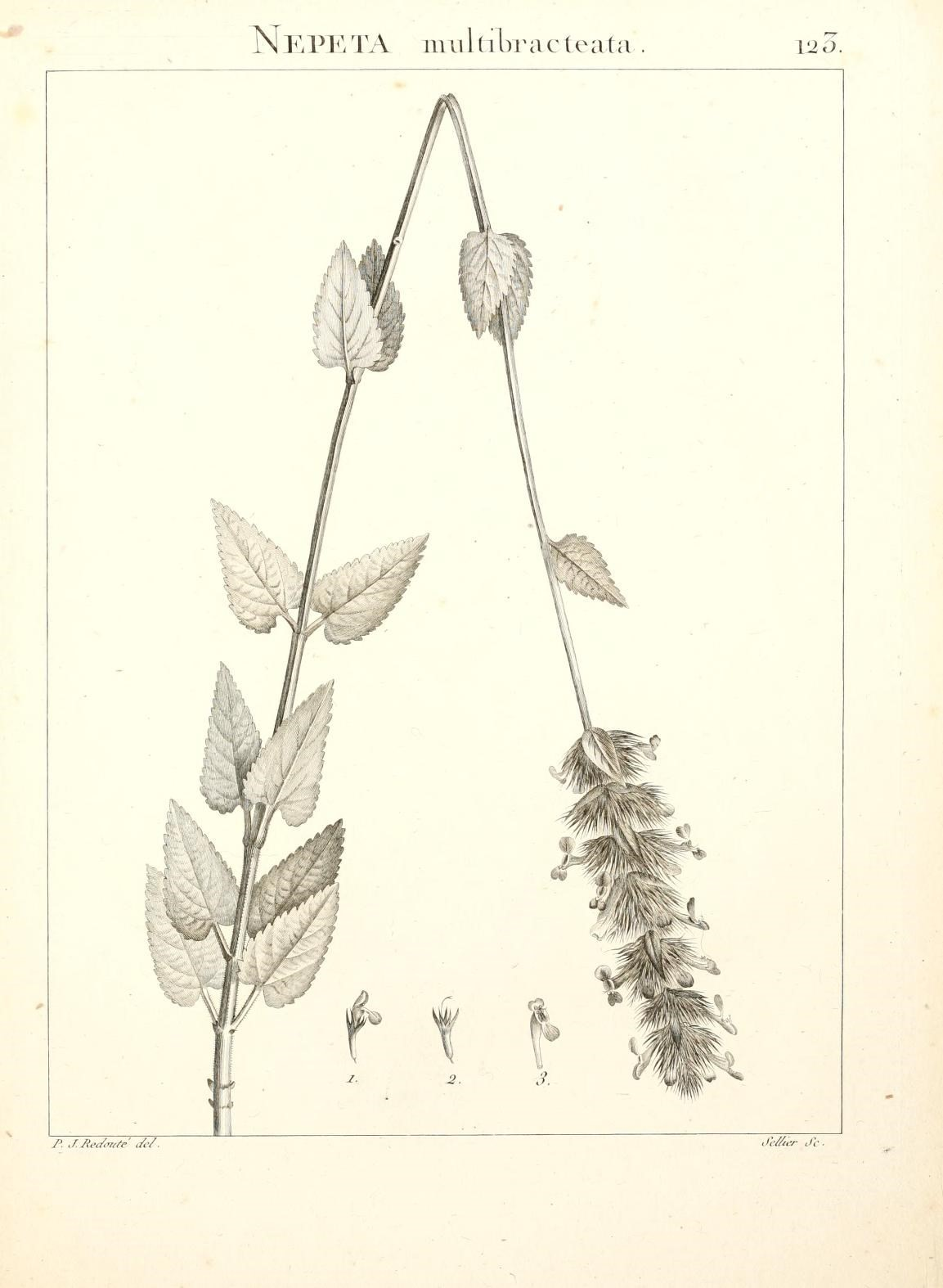 NEPETA nrultibracteata V2D. P. J.Jiednda de/.